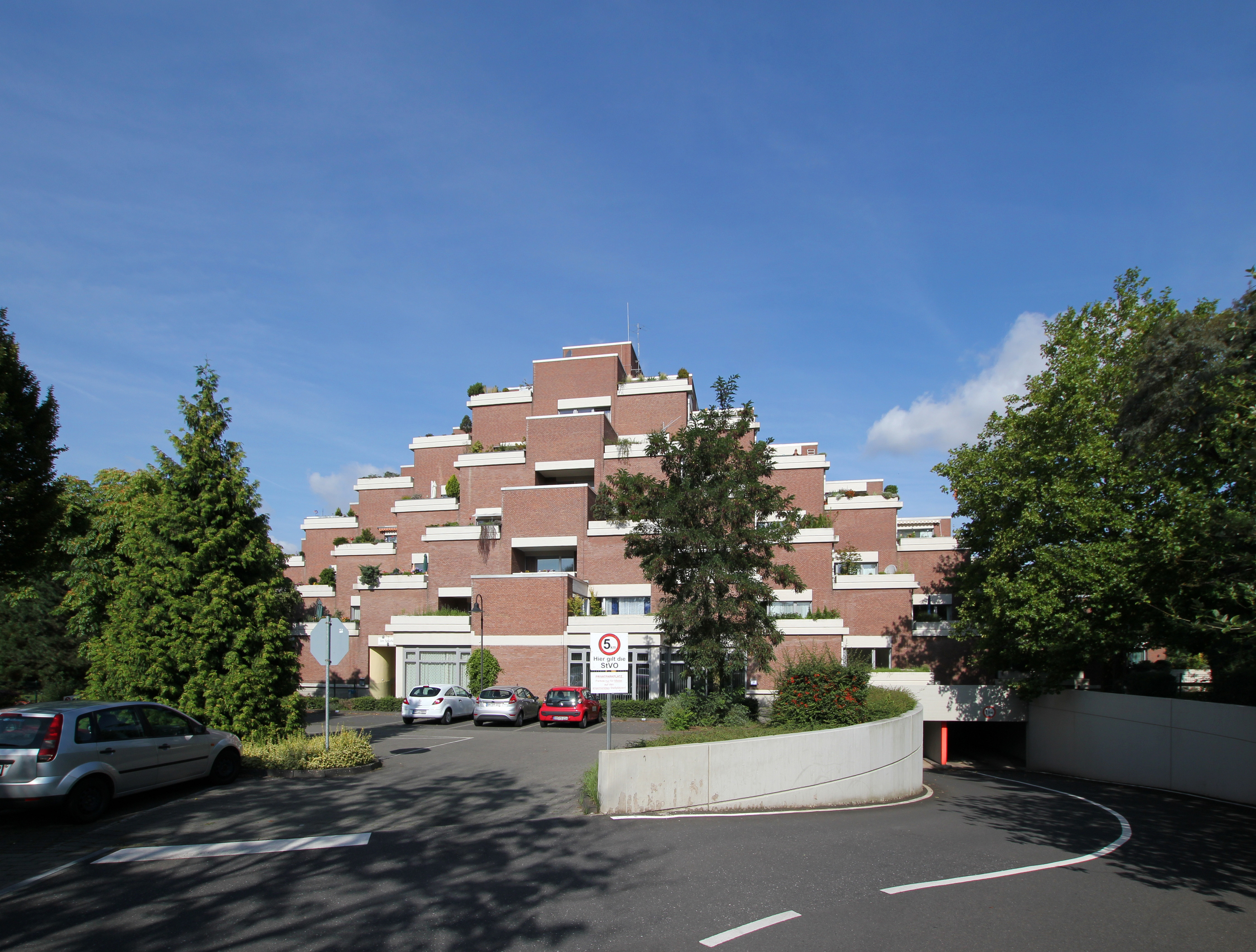 Erftstadt-Liblar